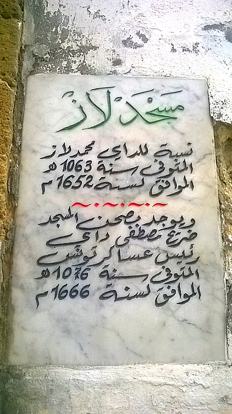 La médina de Tunis مدينة تونس العتيقة